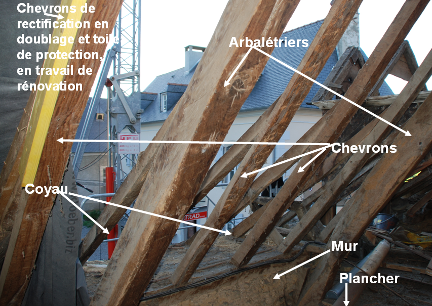 Détail d'une charpente de grange étable à Bourréac (canton de Lourdes-Est) en rénovation (remplacement de l'ancienne couverture d'ardoises). Mise en évidence des coyaux, chevrons secondaires rapportés à la base d'un versant pour adoucir la pente de l'égout et, dans le cas présent, pour assurer la couverture du mur.